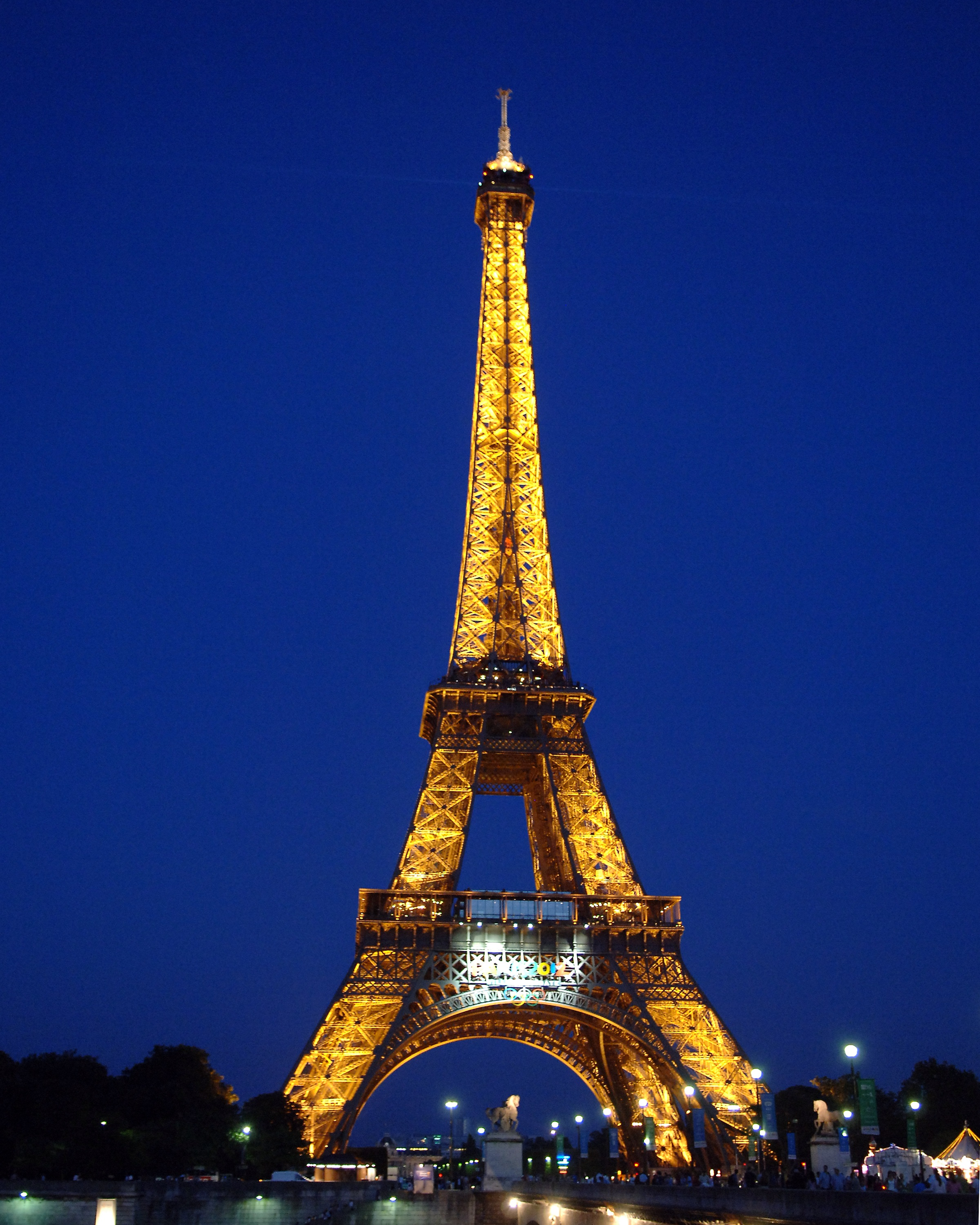 zdjęcie przedstawiające strzelistą wieżę (np. katedry) English | Polski | +/−